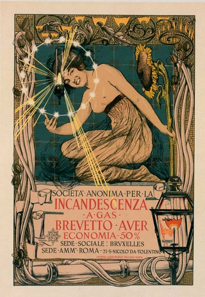 Affiche pour la lampe incandescente à pétrole, 1896, Giovanni Mataloni